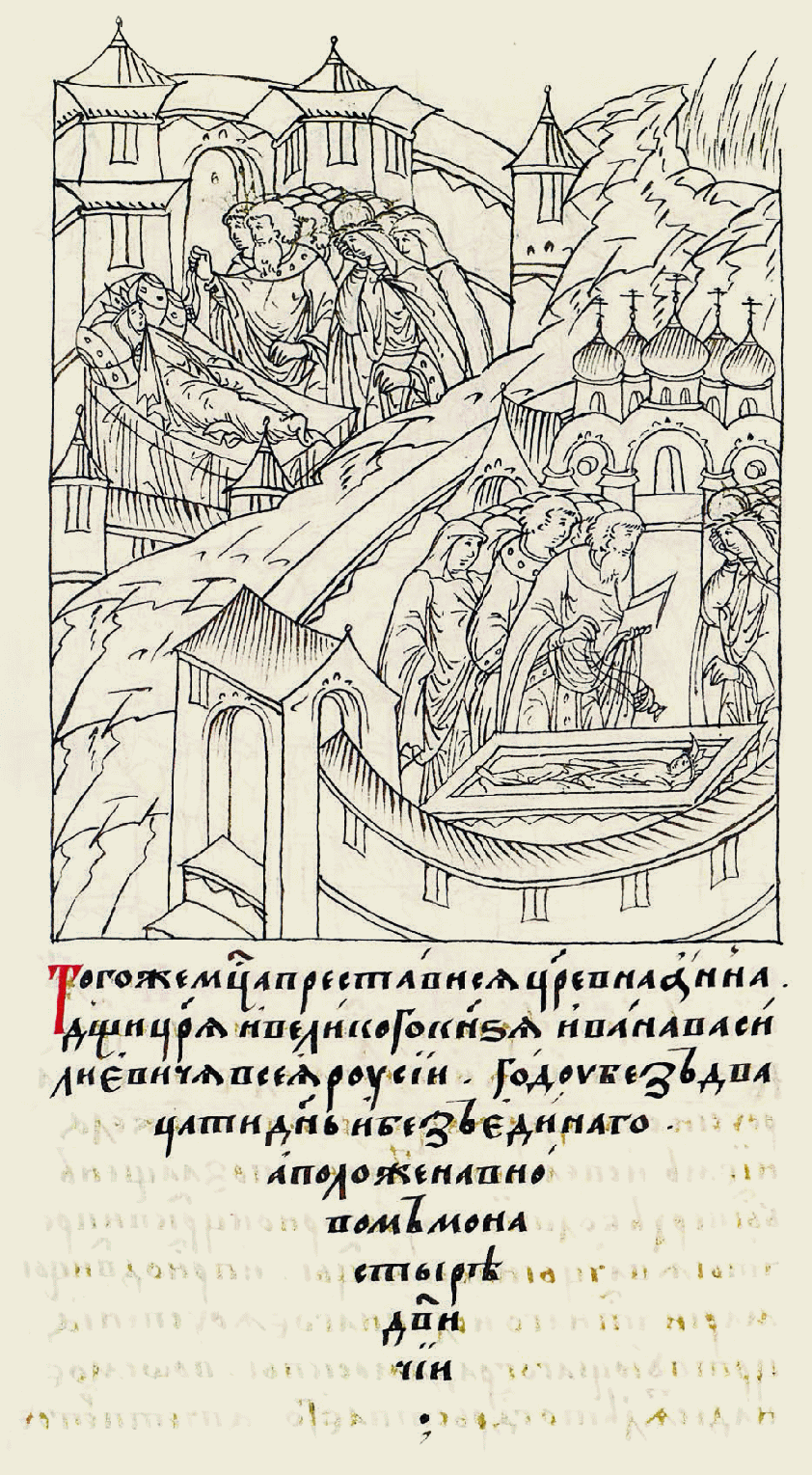 "В том же месяце преставилась ца- ревна Анна, дочь царя и великого князя Ивана Васильевича всея Руси, от роду года без двадцати одного дня; а положена была в Новом девичьем монастырe